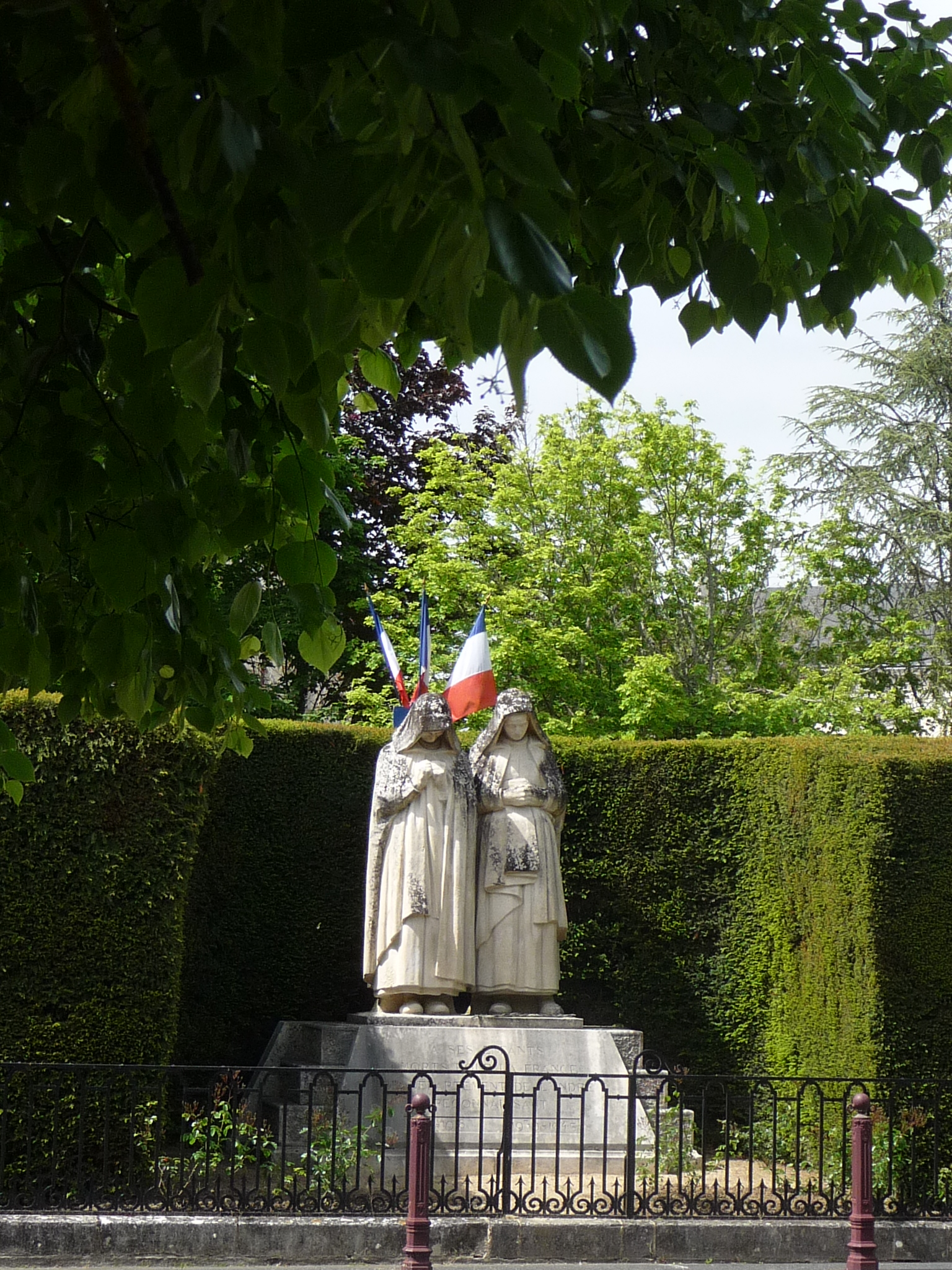 Photo du monument aux morts du département de l'Indre : deux femmes expriment différemment leur douleur devant le corps exhumé ou la tombe d'un fils et d'un époux.